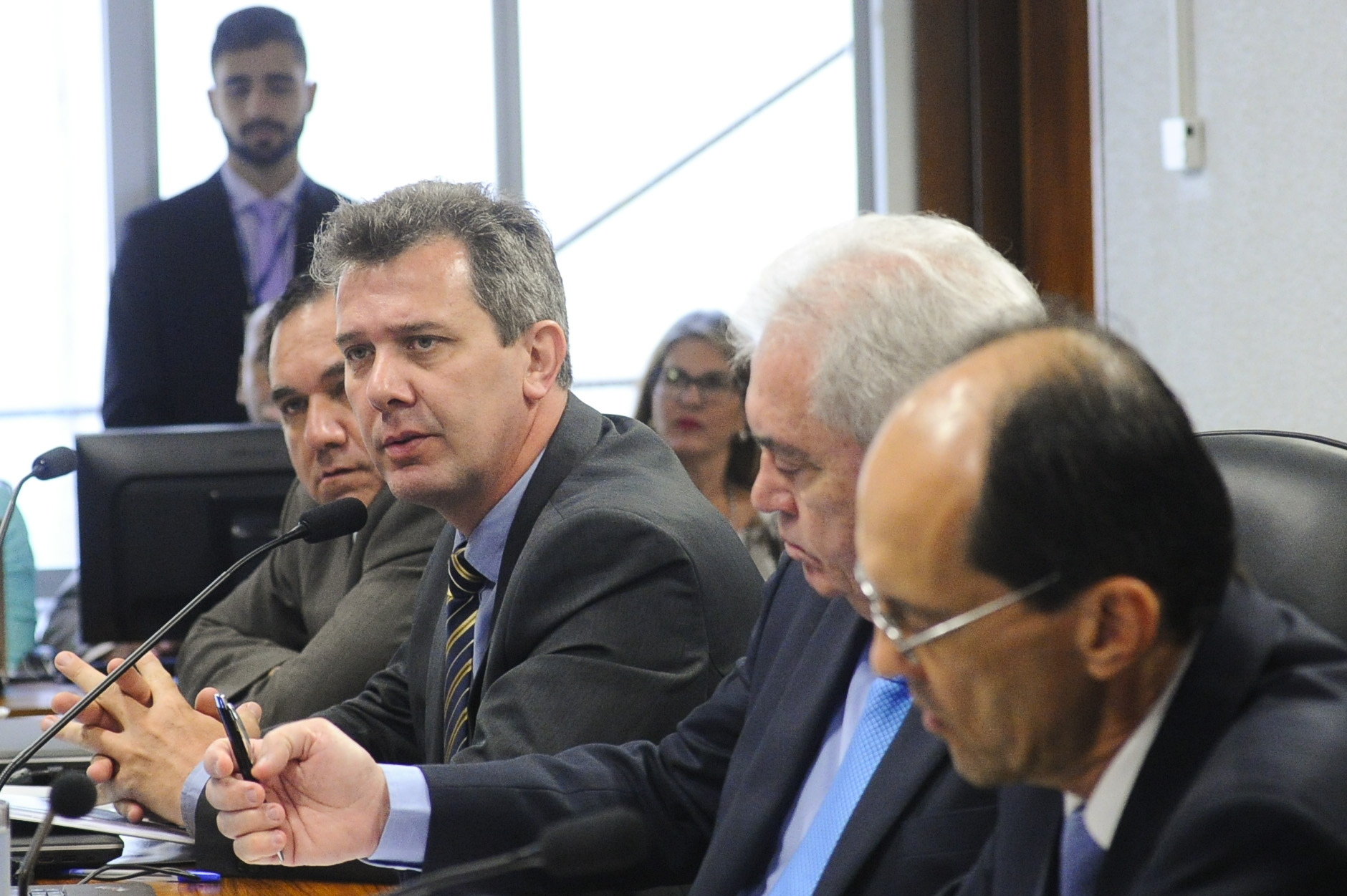 Comissão de Ciência, Tecnologia, Inovação, Comunicação e Informática (CCT) realiza audiência interativa para debater assuntos da área de desenvolvimento tecnológico e inovação. Entre os convidados, o secretário de Educação da Bahia e representantes do Ministério da Ciência, Tecnologia, Inovações e Comunicações. (E/D): presidente da Associação para Promoção da Excelência do Software Brasileiro (Softex), Ruben Delgado; secretário de Política de Informática do Ministério da Ciência, Tecnologia, Inovações e Comunicações (MCTIC), Maximiliano Salvadori Martinhão; presidente da CCT, senador Otto Alencar (PSD-BA); secretário de Desenvolvimento Tecnológico e Inovação do Ministério da Ciência, Tecnologia, Inovações e Comunicações (MCTIC), Álvaro Toubes Prata. Foto: Geraldo Magela/Agência Senado